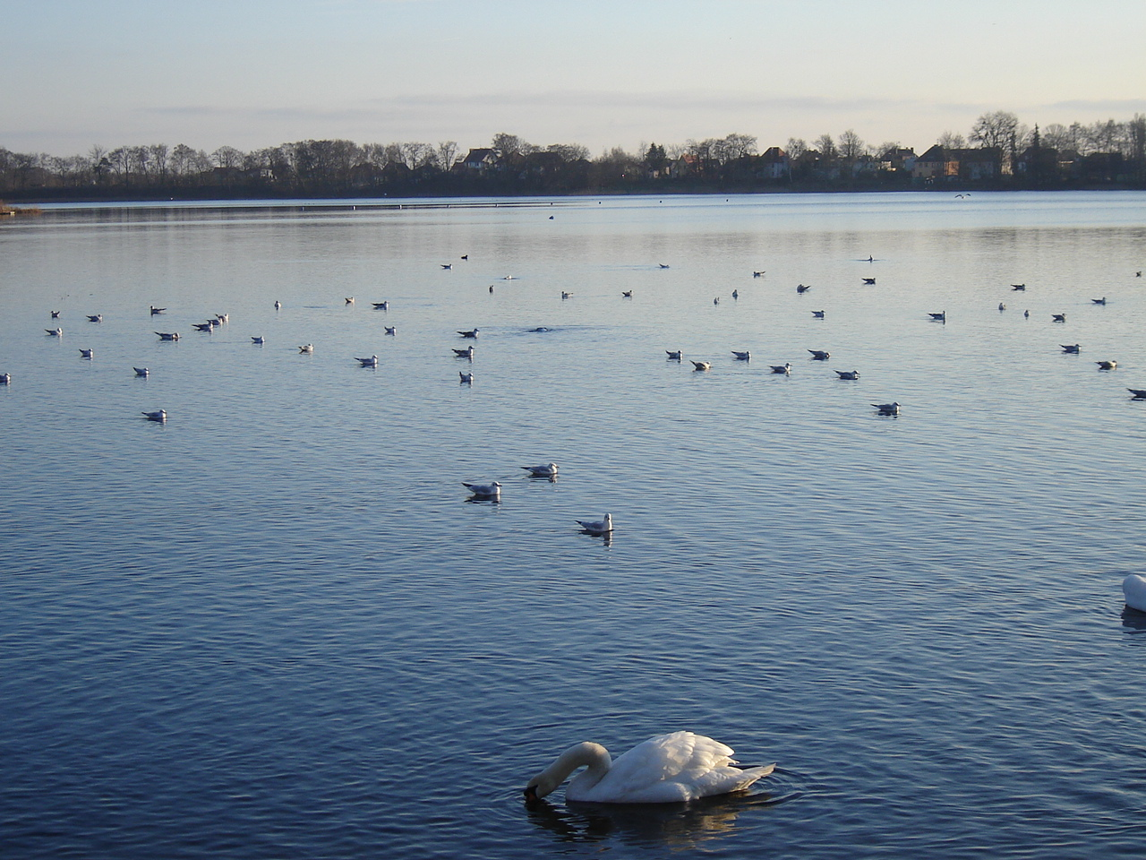 Kluki – jezioro w granicach miasta Choszczno.